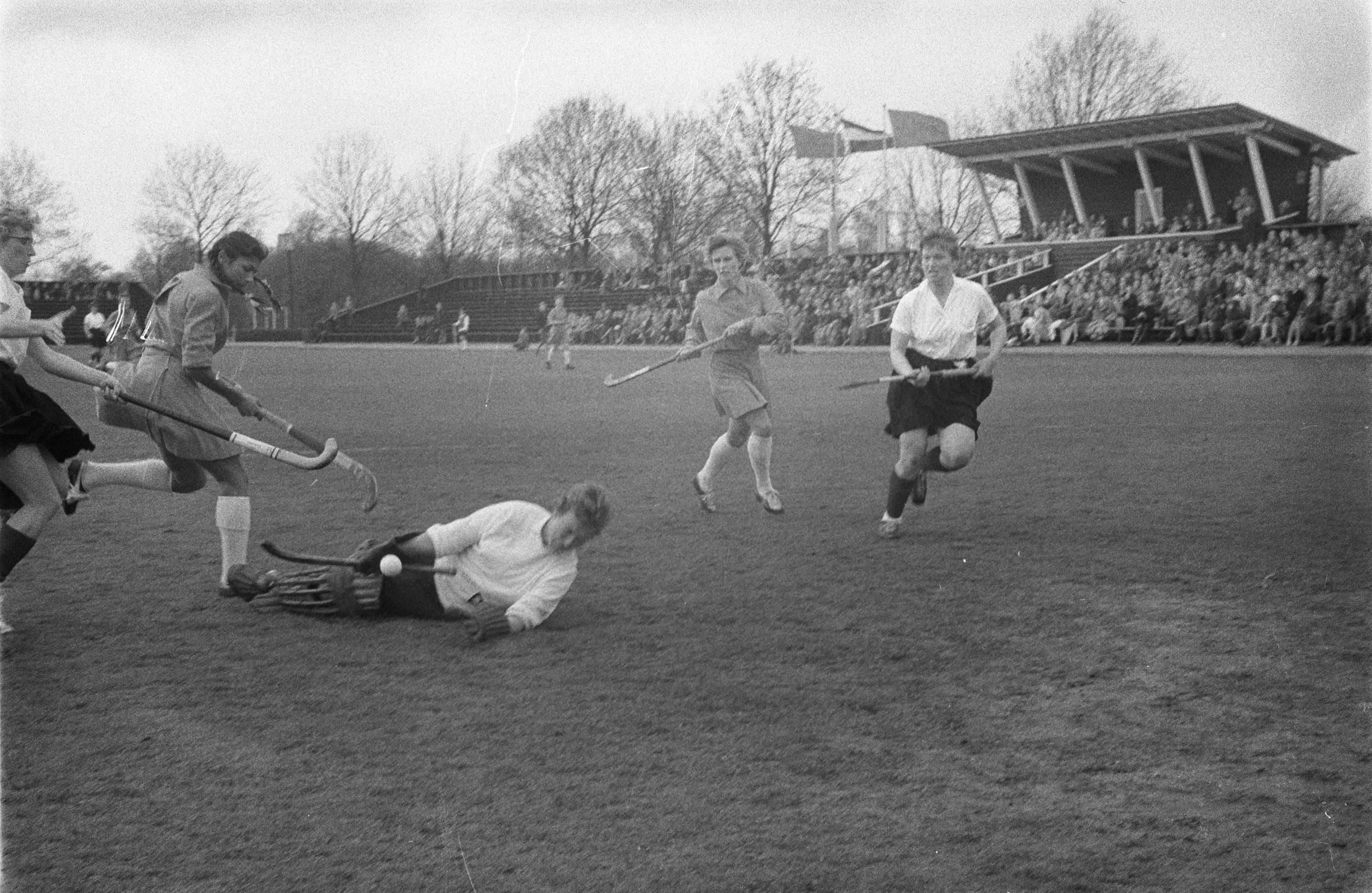 Collectie / Archief : Fotocollectie Anefo Reportage / Serie : [ onbekend ] Beschrijving : Hockey dames Nederland tegen Duitsland Datum : 10 april 1960 Trefwoorden : hockey Fotograaf : Pot, Harry / Anefo Auteursrechthebbende : Nationaal Archief Materiaalsoort : Negatief (zwart/wit) Nummer archiefinventaris : bekijk toegang 2.24.01.05 Bestanddeelnummer : 911-1613